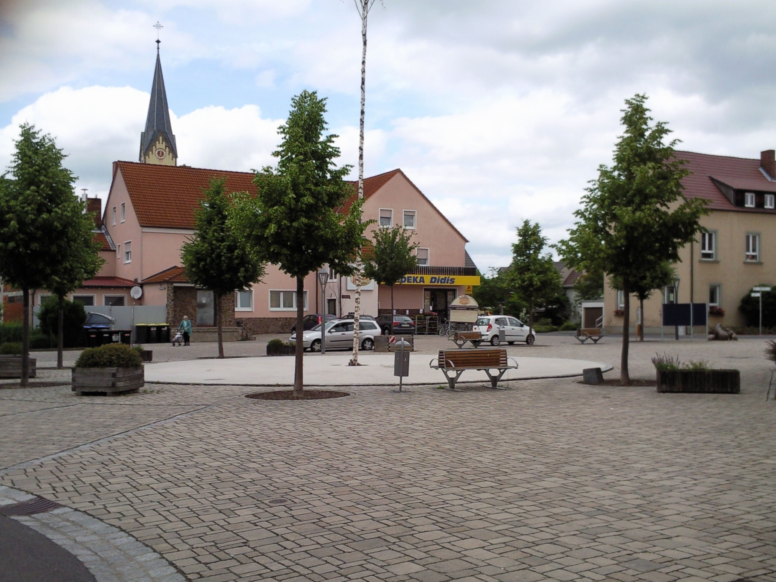 Dorfmitte